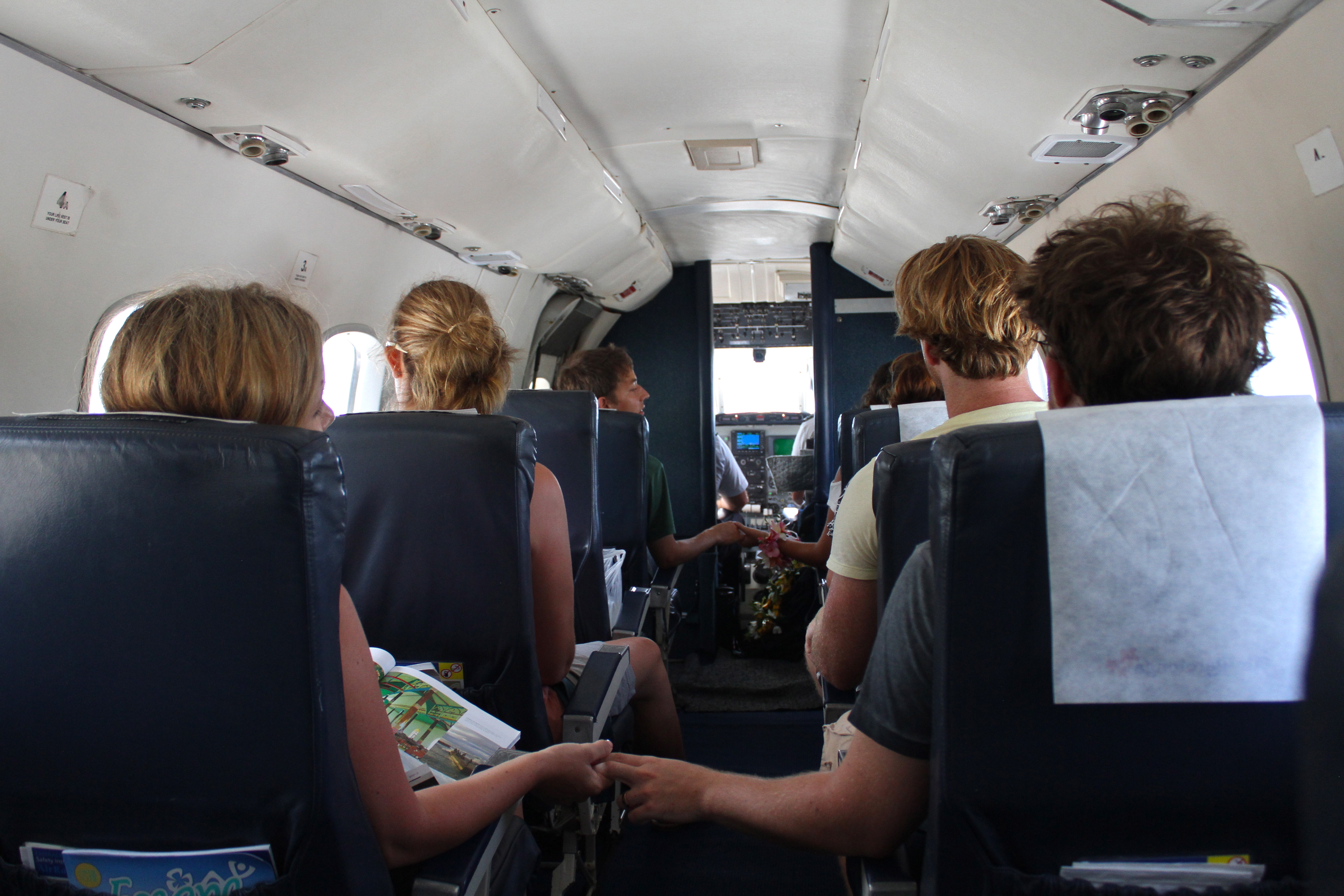 Air Rarotonga cabin